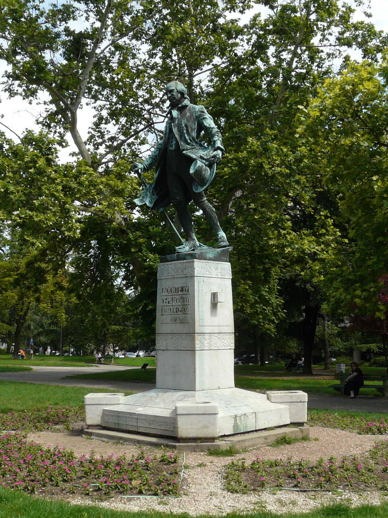 Паметник на Доситей Обрадович